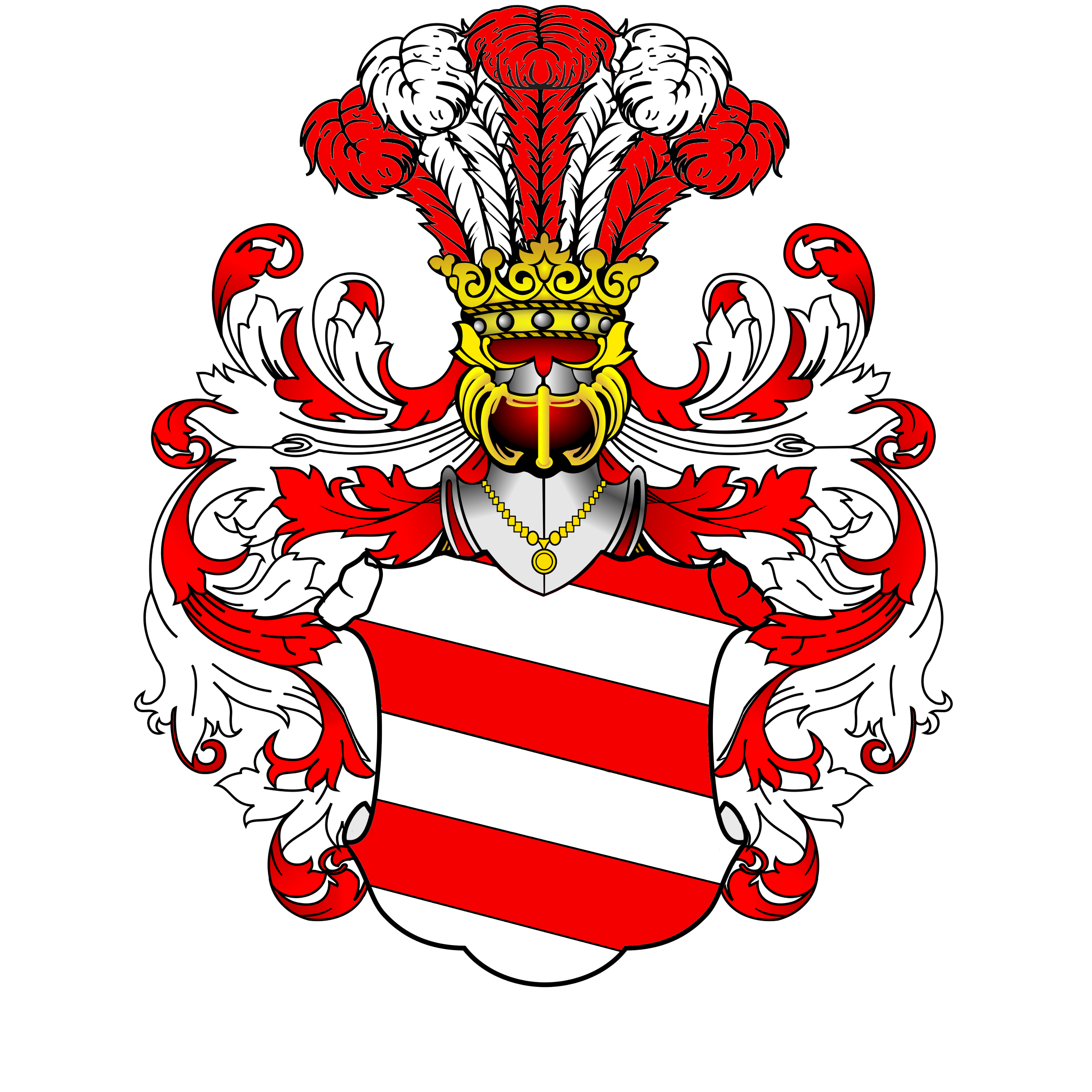 Lo stemma dei conti Pola